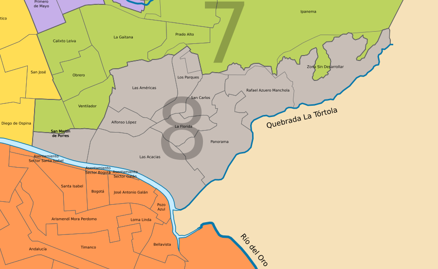 División barrial comuna 8, Neiva, departamento de Huila